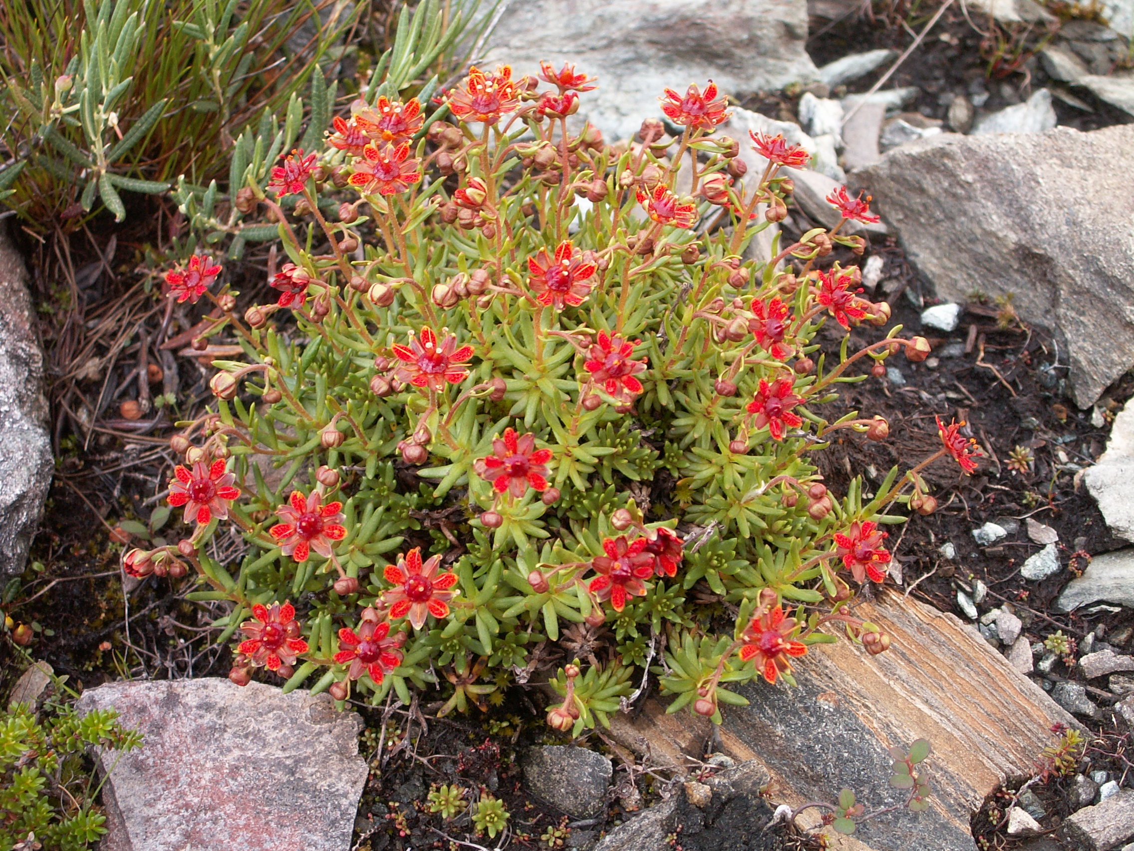 Gullbräcka, röd variant. Handöl, Jämtland.